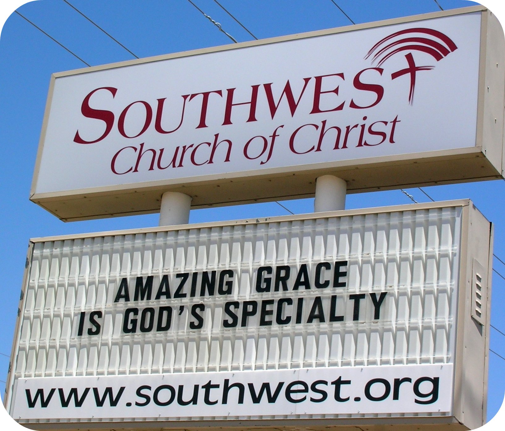 Esta foto se tomó el 27 de mayo, 2006 en Zita, Ciudad de Amarillo, TX, Estados Unidos.